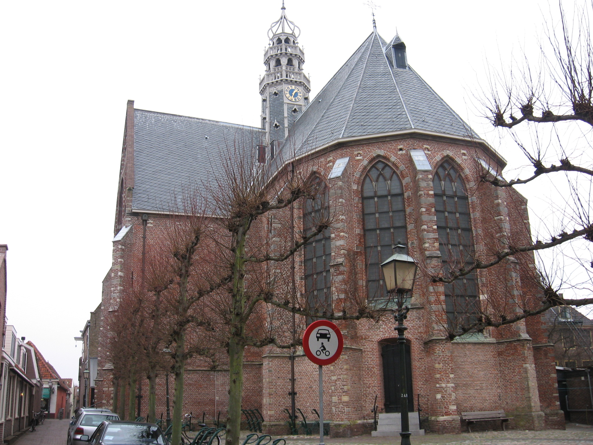 Hoorn, dec 2006